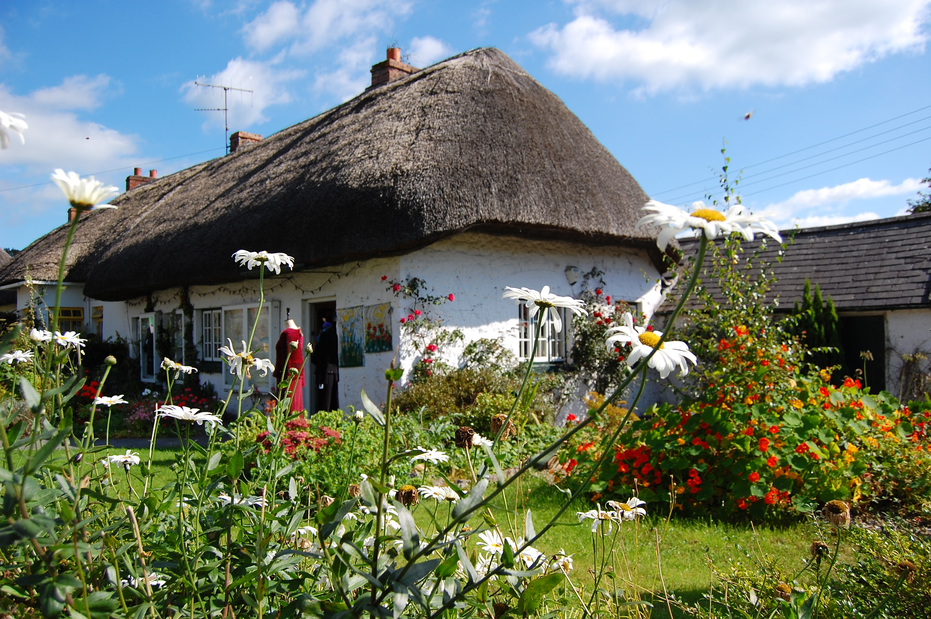 Cottage in Adare, County Limerick, Irland